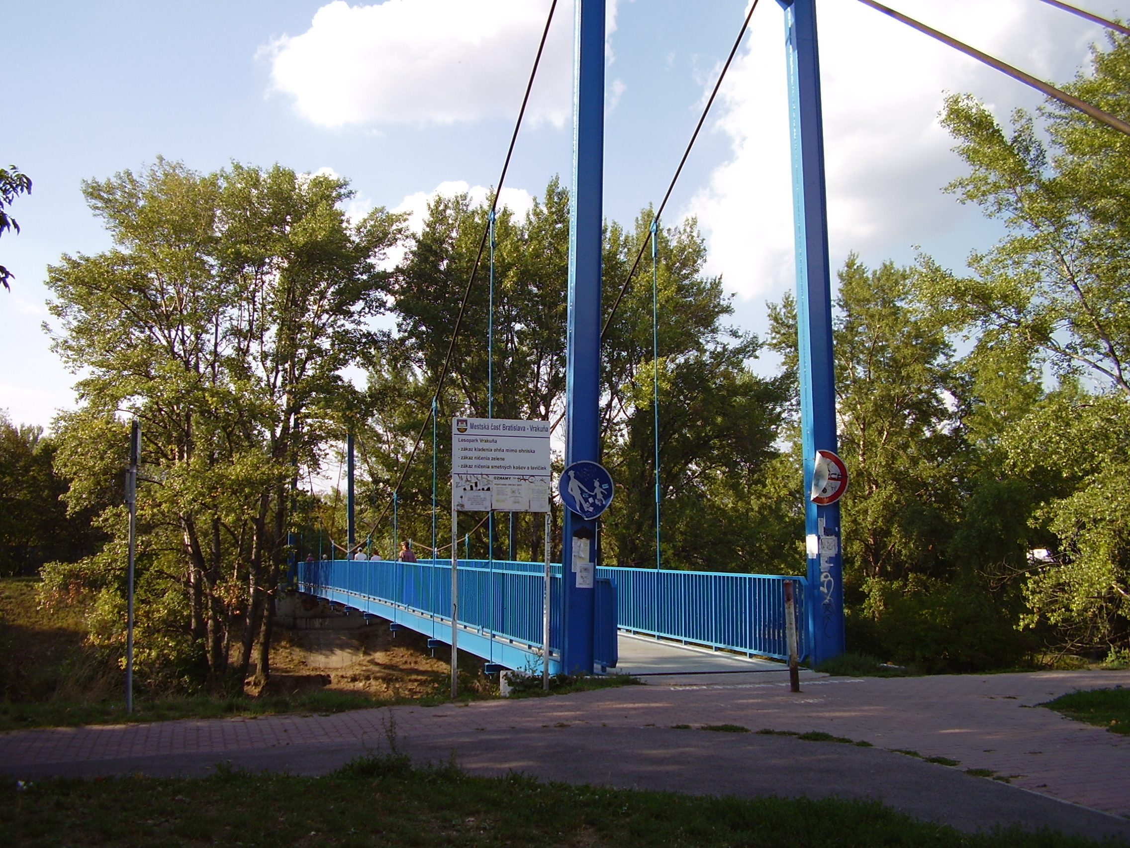 Bratislava